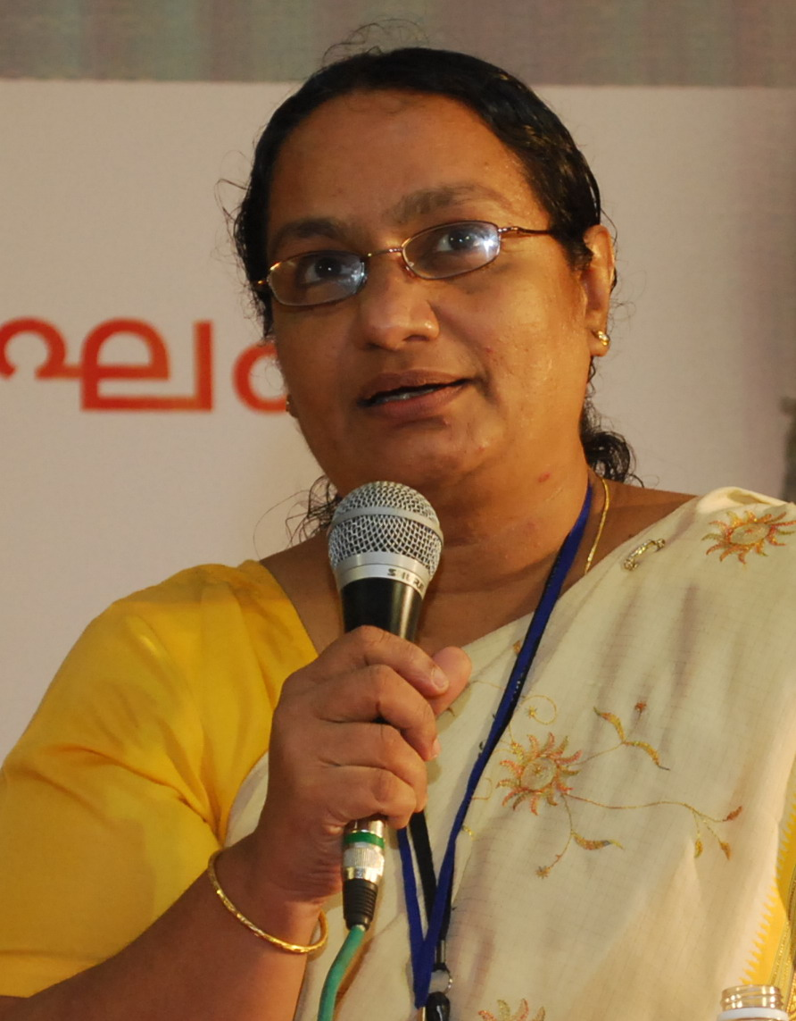 സിസ്റ്റർ ജെസ്മി